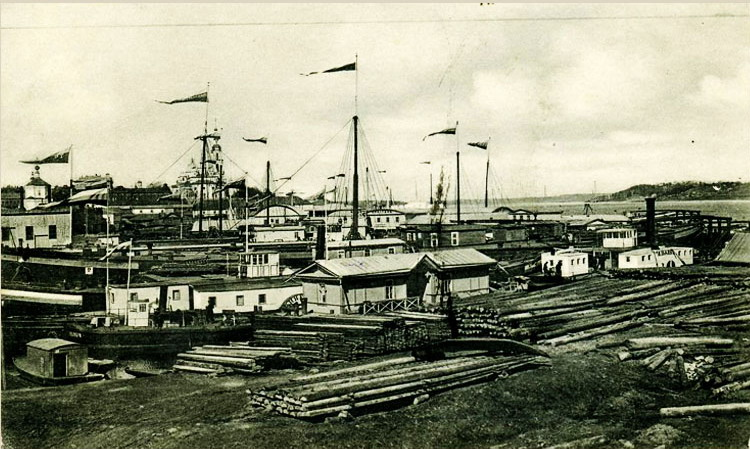 Кинешма. В гавани. Почтовая открытка. Издание Л.М.Гольдфейна. 1900-е г.г.